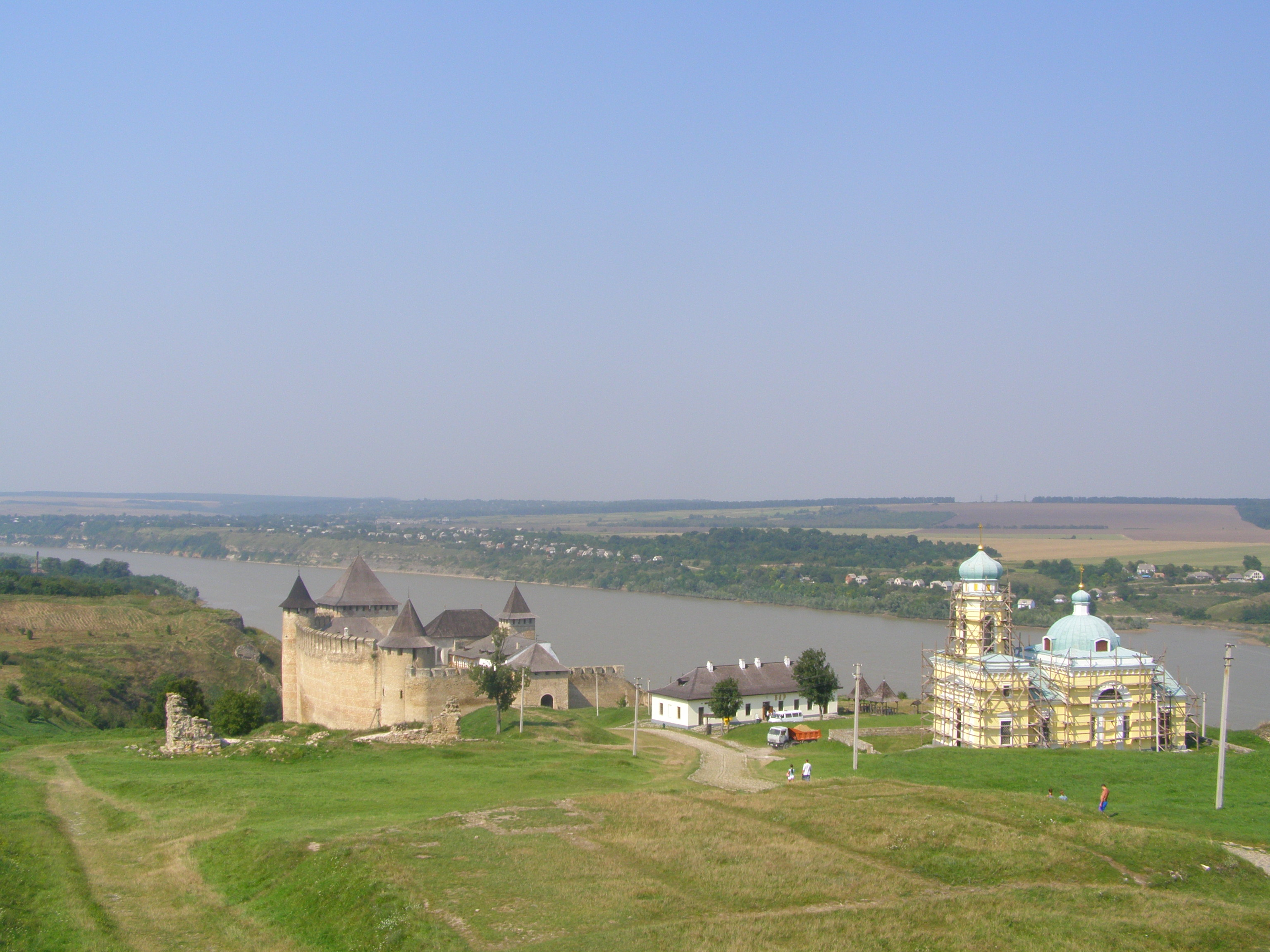 Chotyn, pohled na pevnost od jižní brány, v pozadí Dněstr